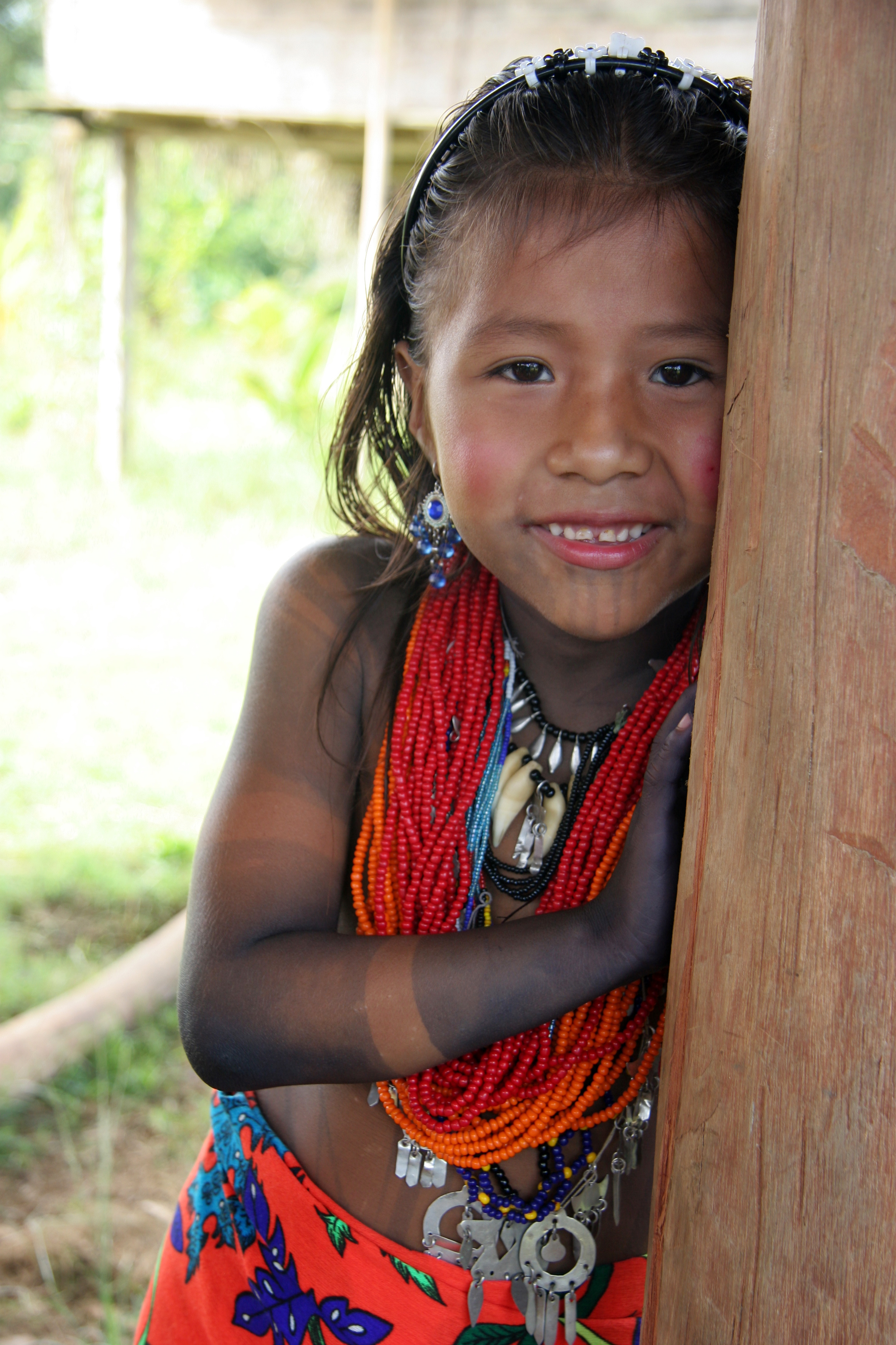 Panama, Darien, Fillette Embera habillée pour la danse